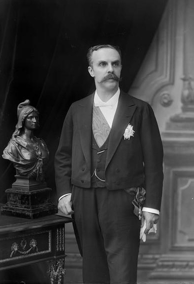 Jean Casimir-Perier (1847-1907)